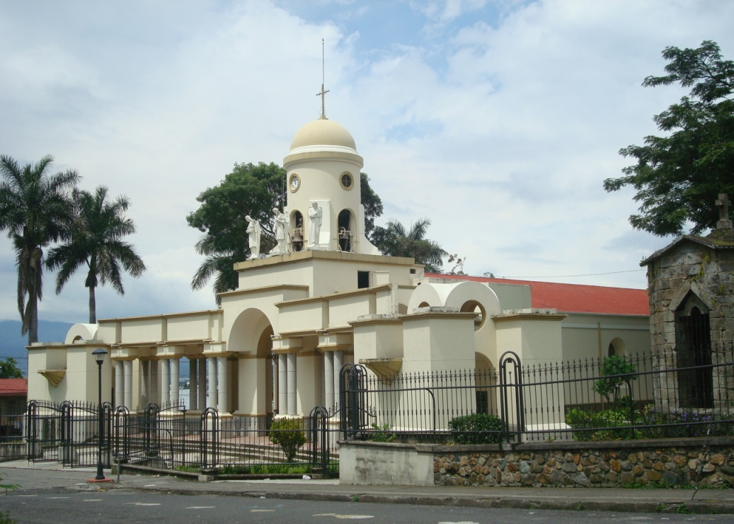 Iglesia de San Miguel Arcángel. Escazú Centro. Costa Rica